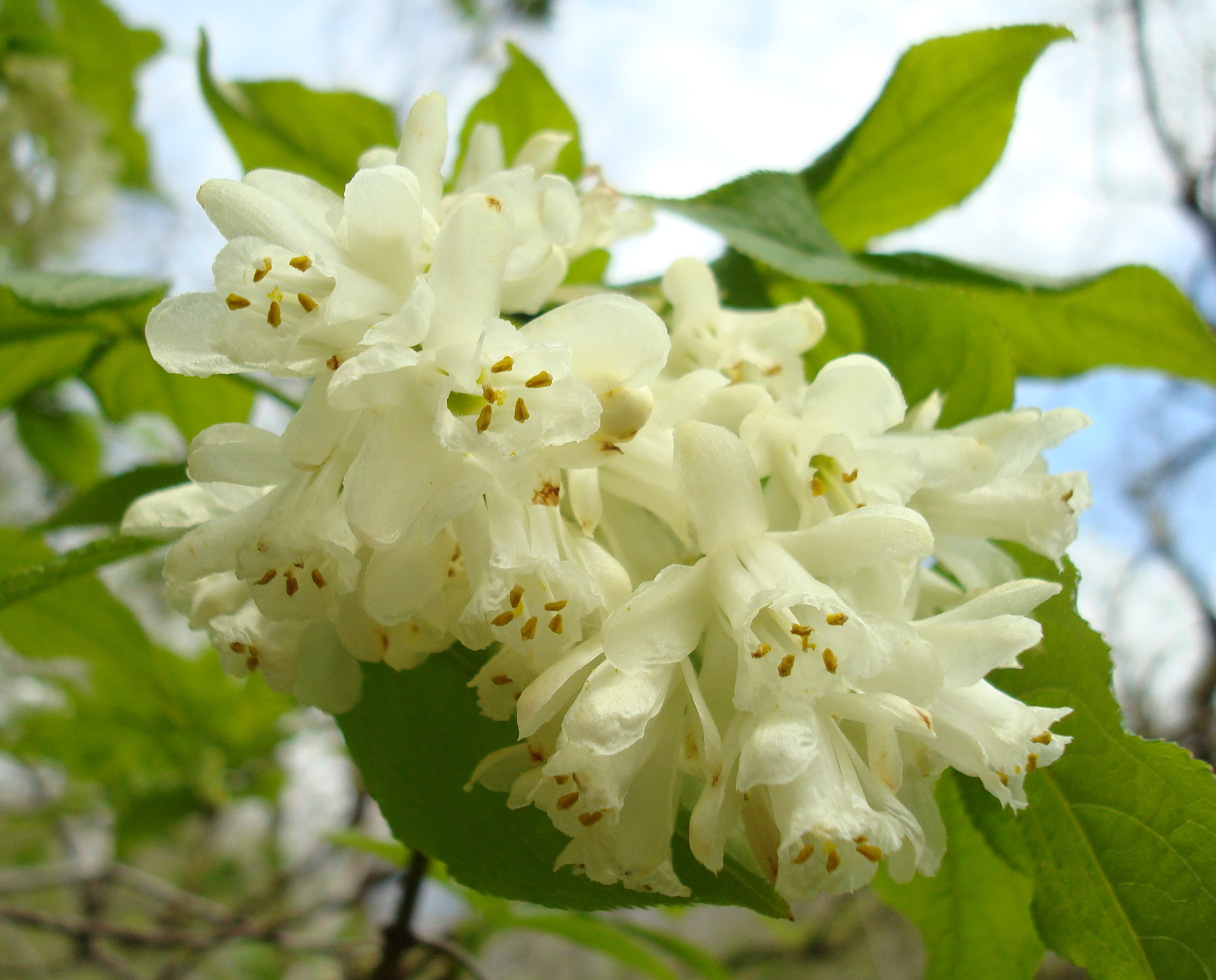 Цветы клека́чки колхидской или Джонджоли, или Стафи́лея колхидская (лат. Staphýlea colchica) — растение в виде кустарников или деревьев, встречающееся в Сочинском национальном парке. Редкий вид. Эндемик Кавказа. Внесен в Красную книгу. Цветы используют для приготовления приправ (грузинское джоджоли). Сочи This image is related to the protected area of Russia number 2300430